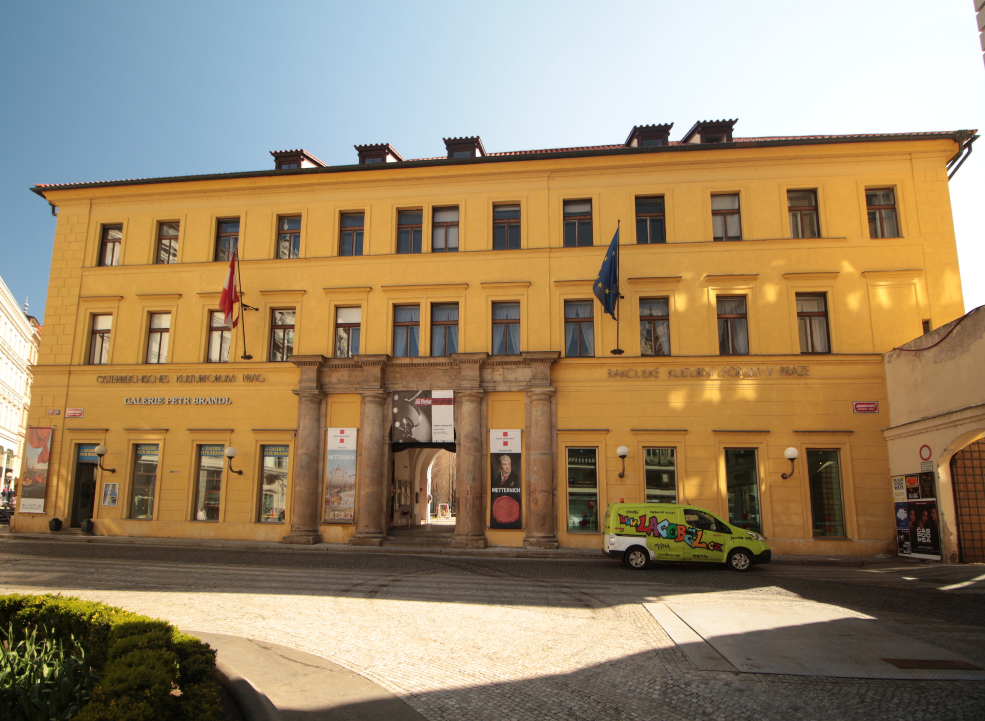 Jungmannovo náměstí